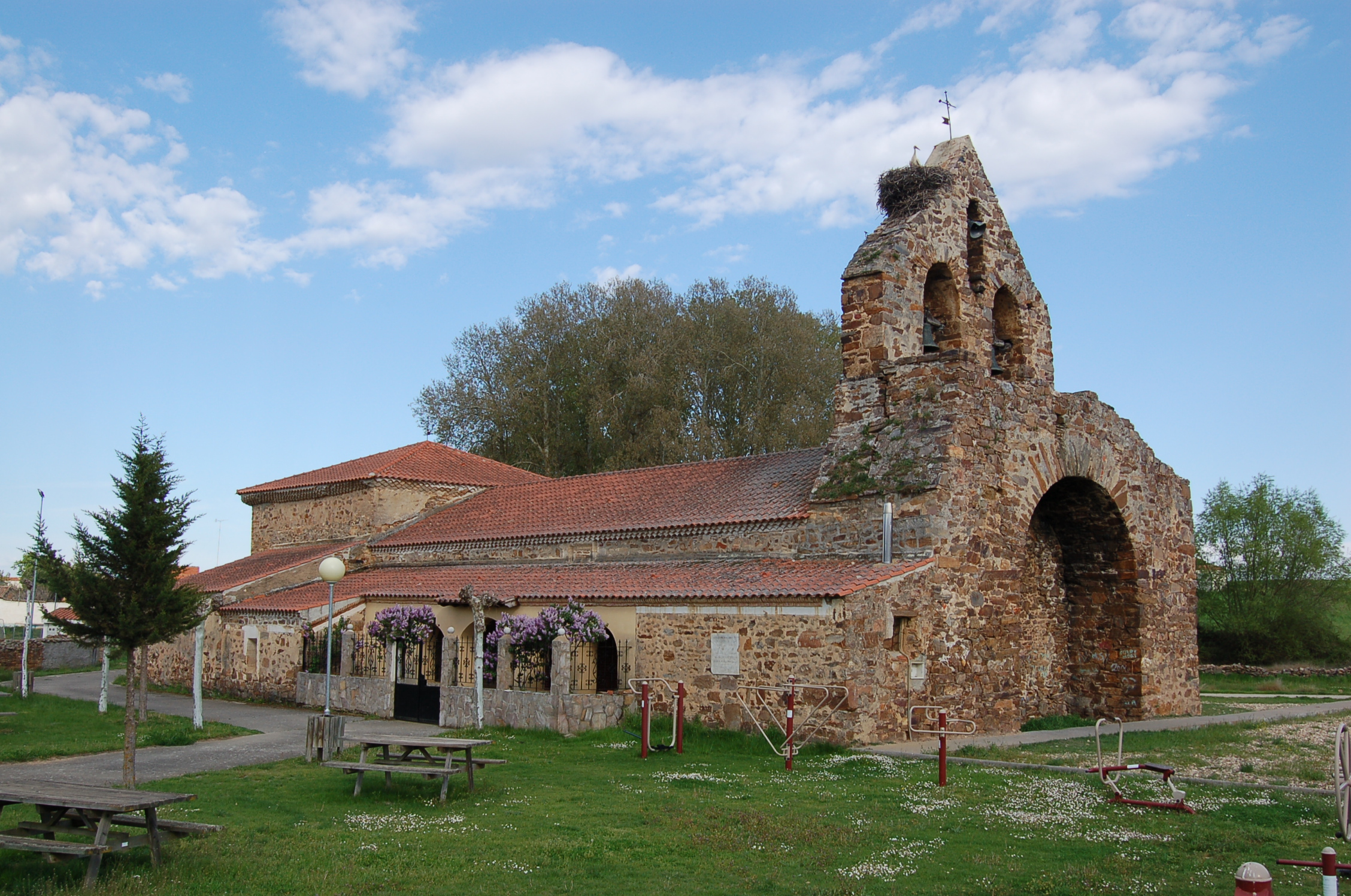 Igrexa Friera de Valverde